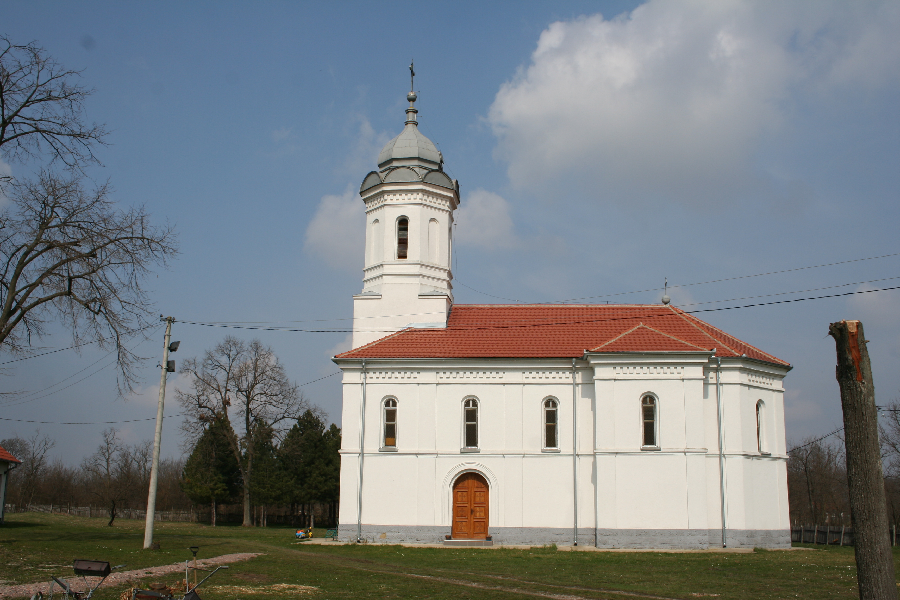 Stublenica, Crkva Sv Proroka Ilije